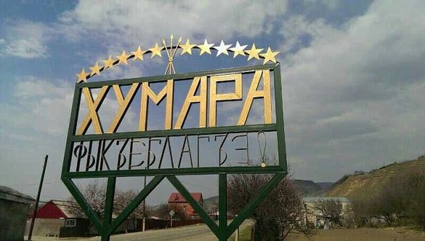 Адыгэбзэ: Хъумэрэн дэлъэдапIэ